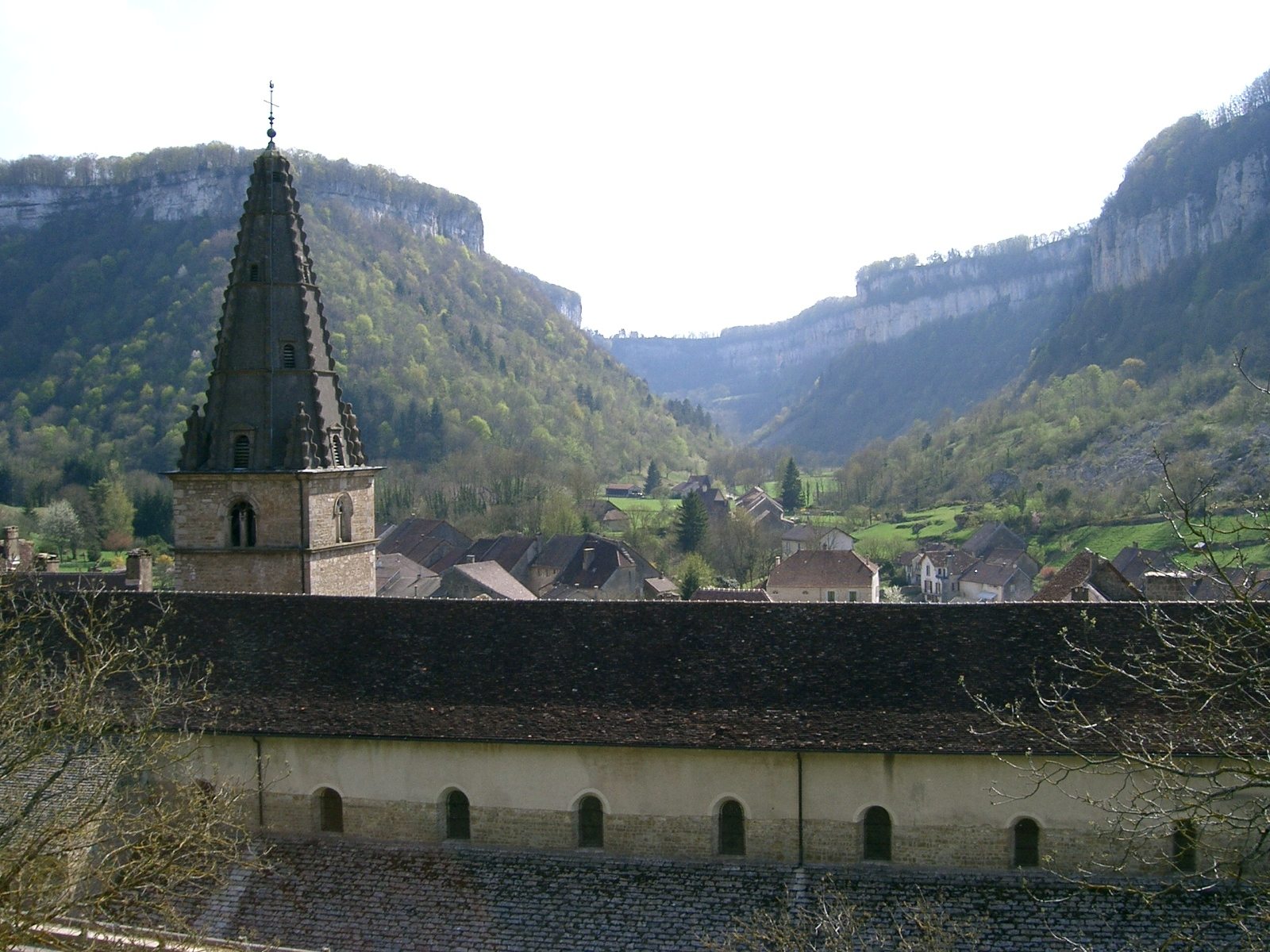 Baume les Messieurs dans le Jura (39) en France. Ancienne abbaye et site de reculée jurassienne. self made PRA